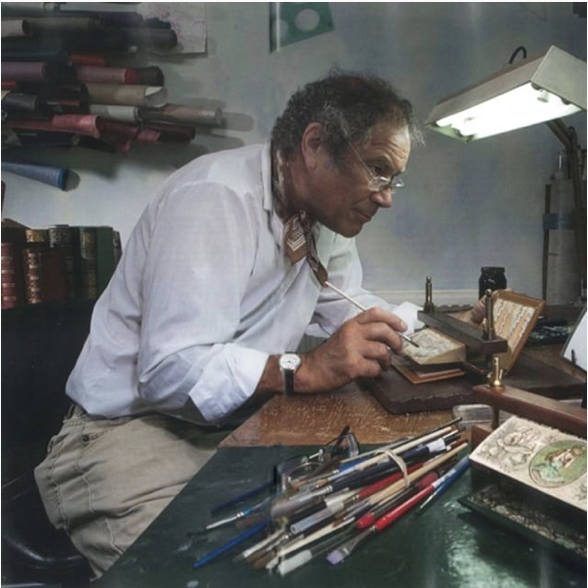 Den engelske snittmaleren Martin Frost, England, i arbeid